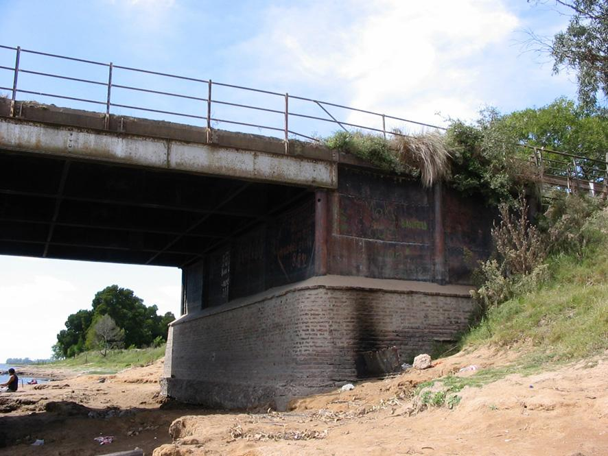 Vista estribo lado Castelli con mampostería de refuerzo en una etapa posterior